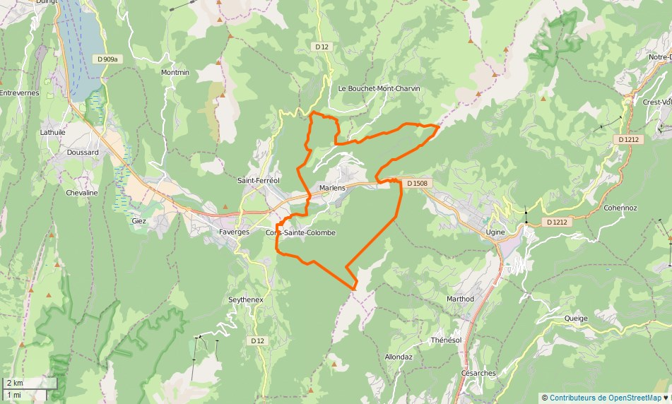 Val-de-Chaise Limite communale This map may be incomplete, and may contain errors. Don't rely solely on it for navigation.